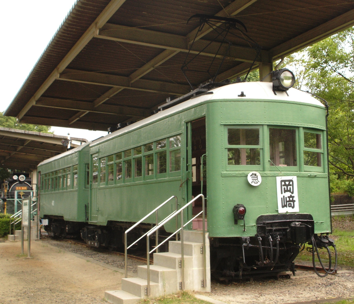 名鉄モ400形電車